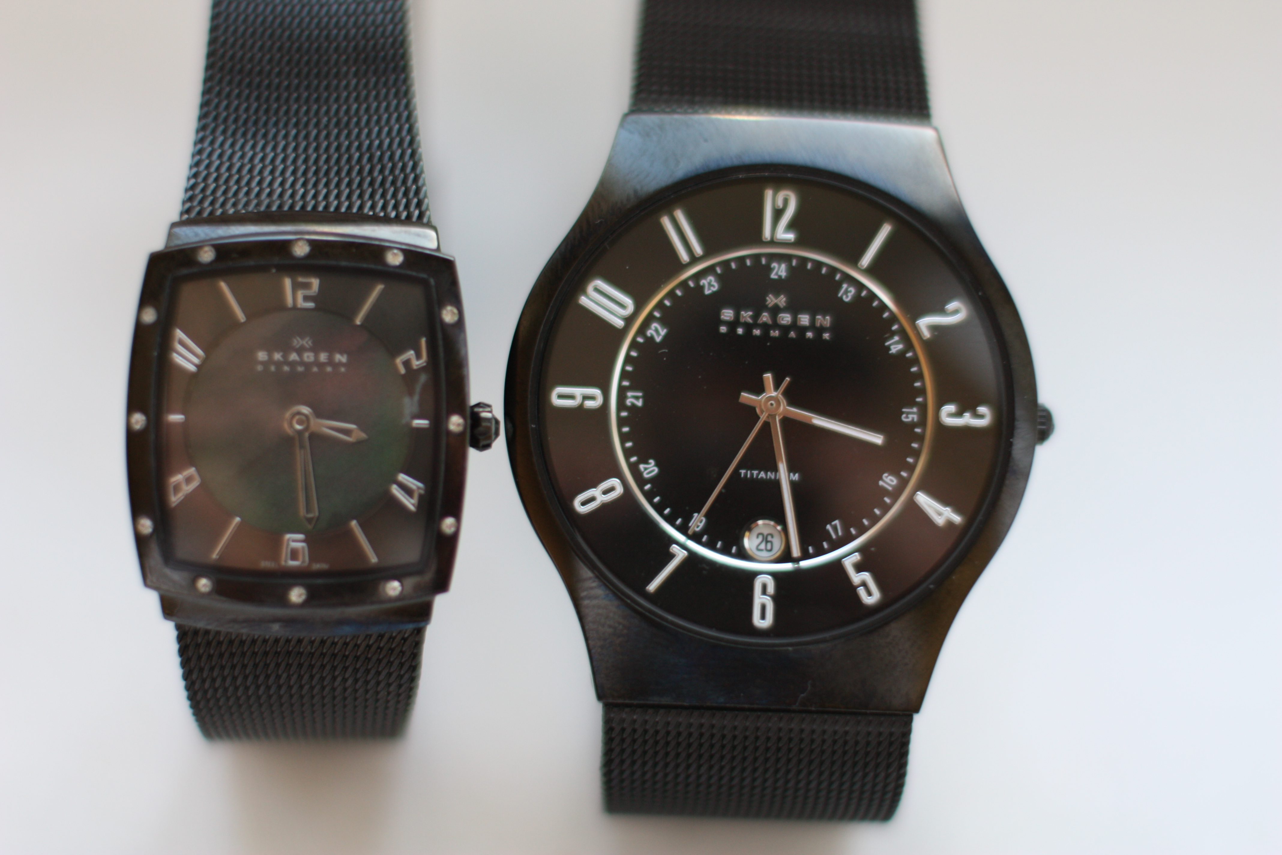 Skagen Herrenuhr Damenuhr, Wristwatches; Skagen design